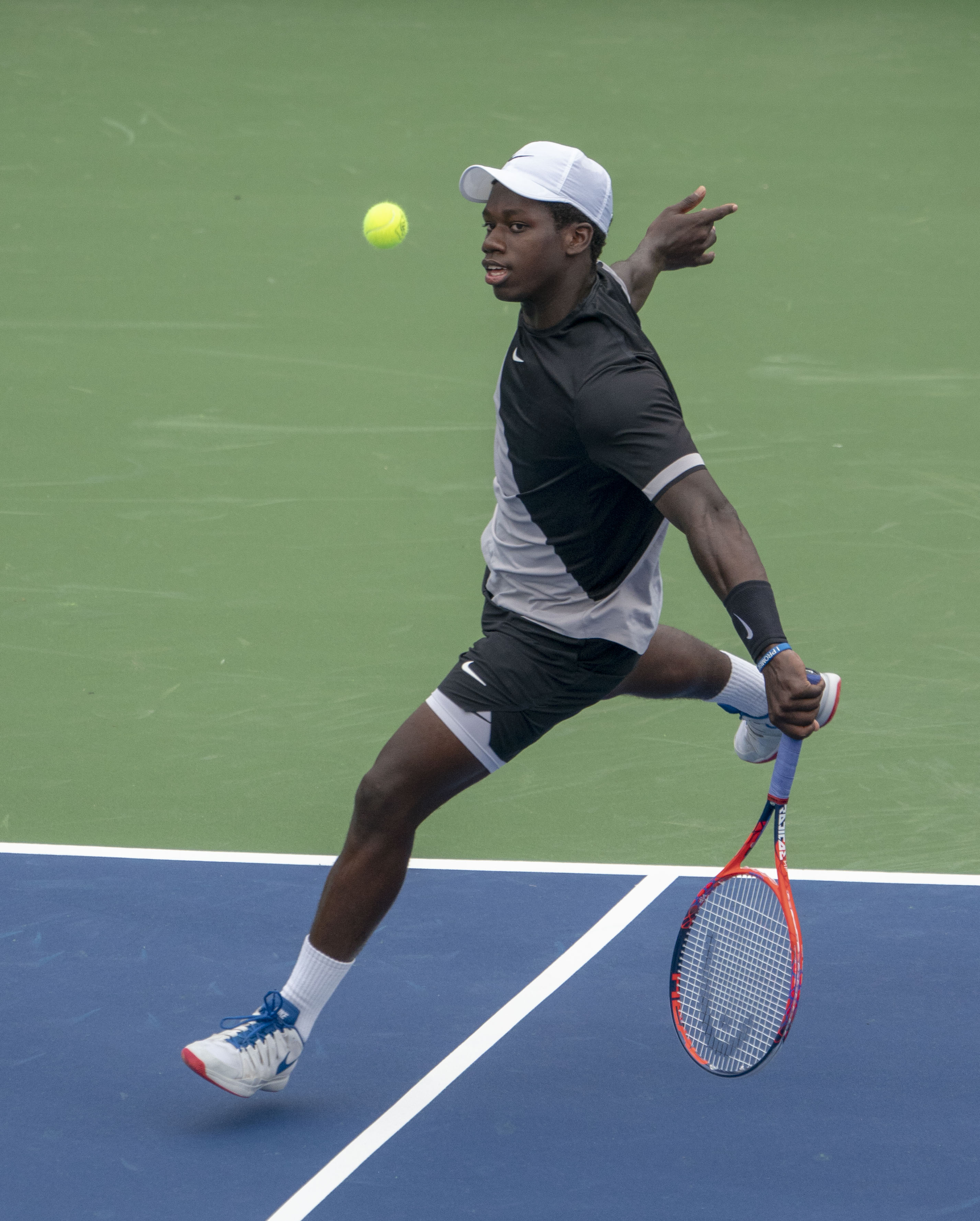 2018 Citi Open Tennis